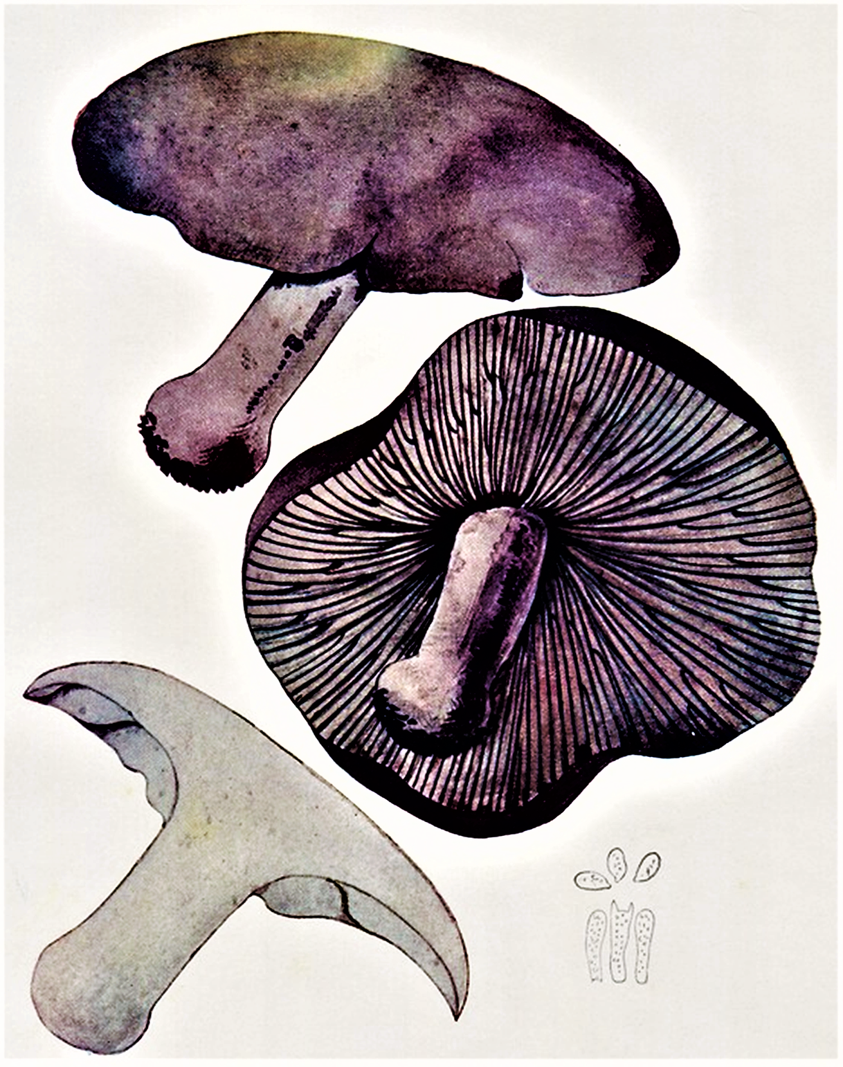 Giacomo Bresadola: Tricholoma nudum Bull. (1790), heute Lepista nuda Cooke (1871)